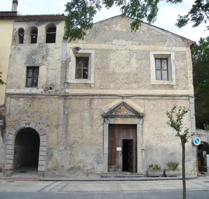 Francesco Stuppello, Tortora, Chiesa SS Annunziata